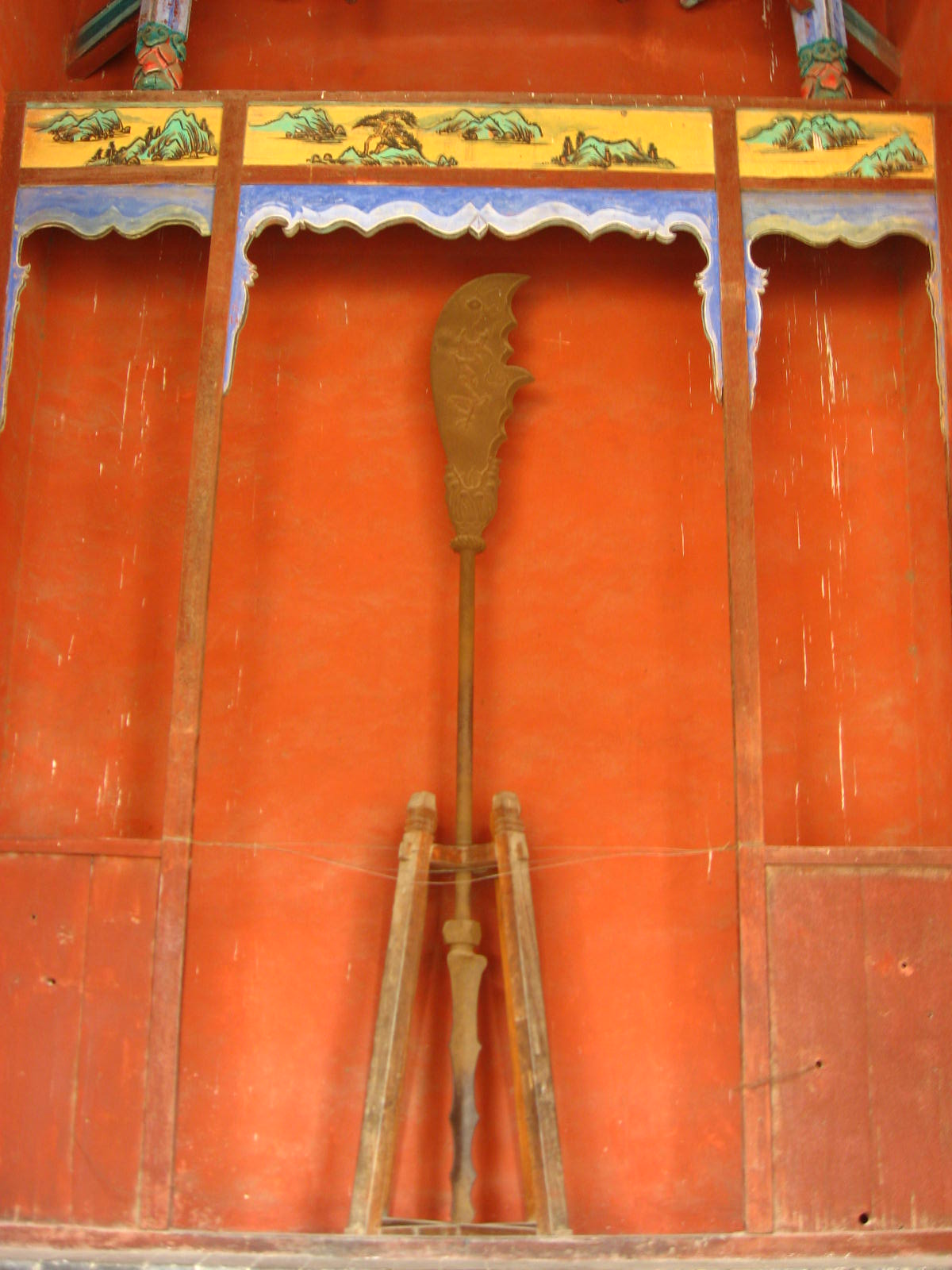 山西關帝廟－青龍偃月刀